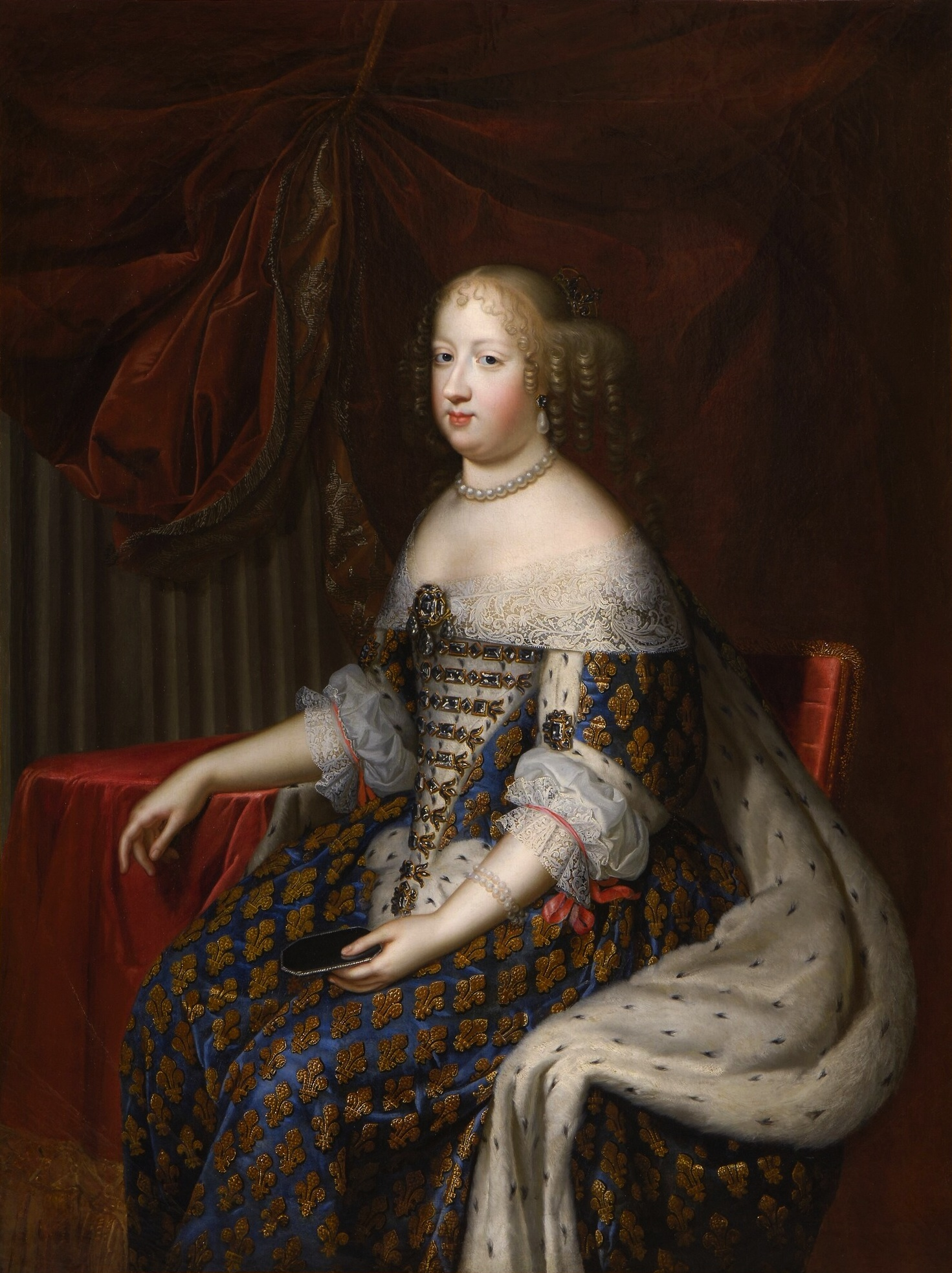 Marie-Thérèse d'Autriche (1638-1683), reine de France